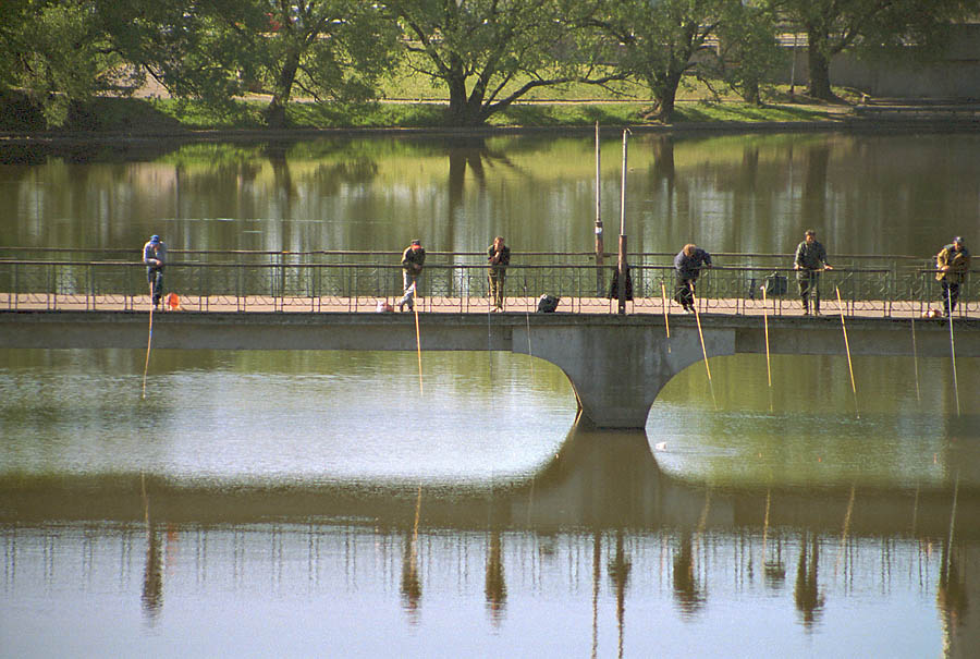 Royal ponds in Kaliningrad (2000)